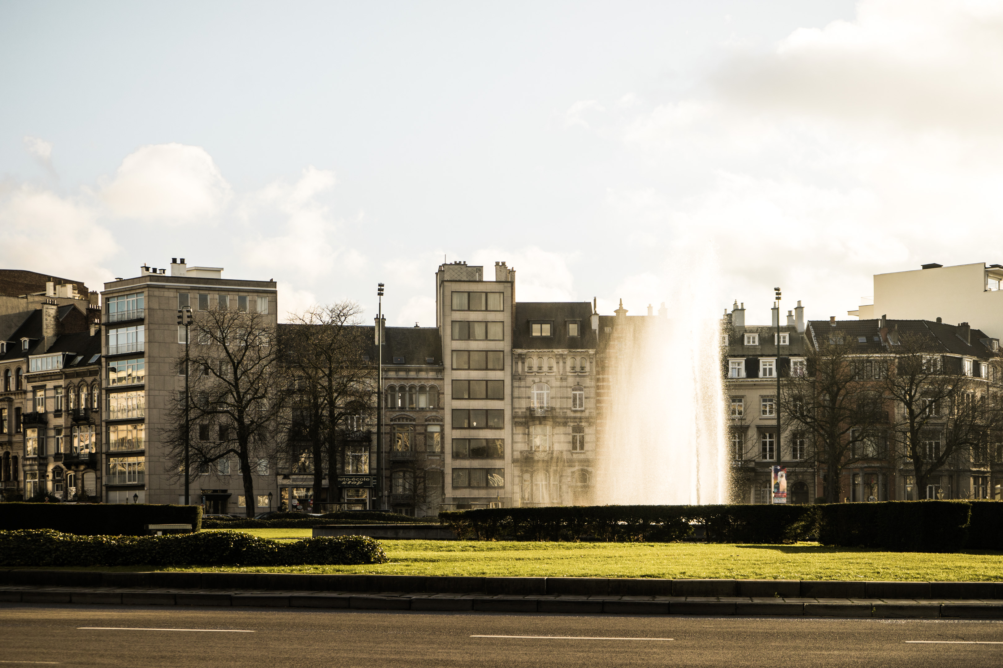 Rond Point montgomery et sa fontaine.